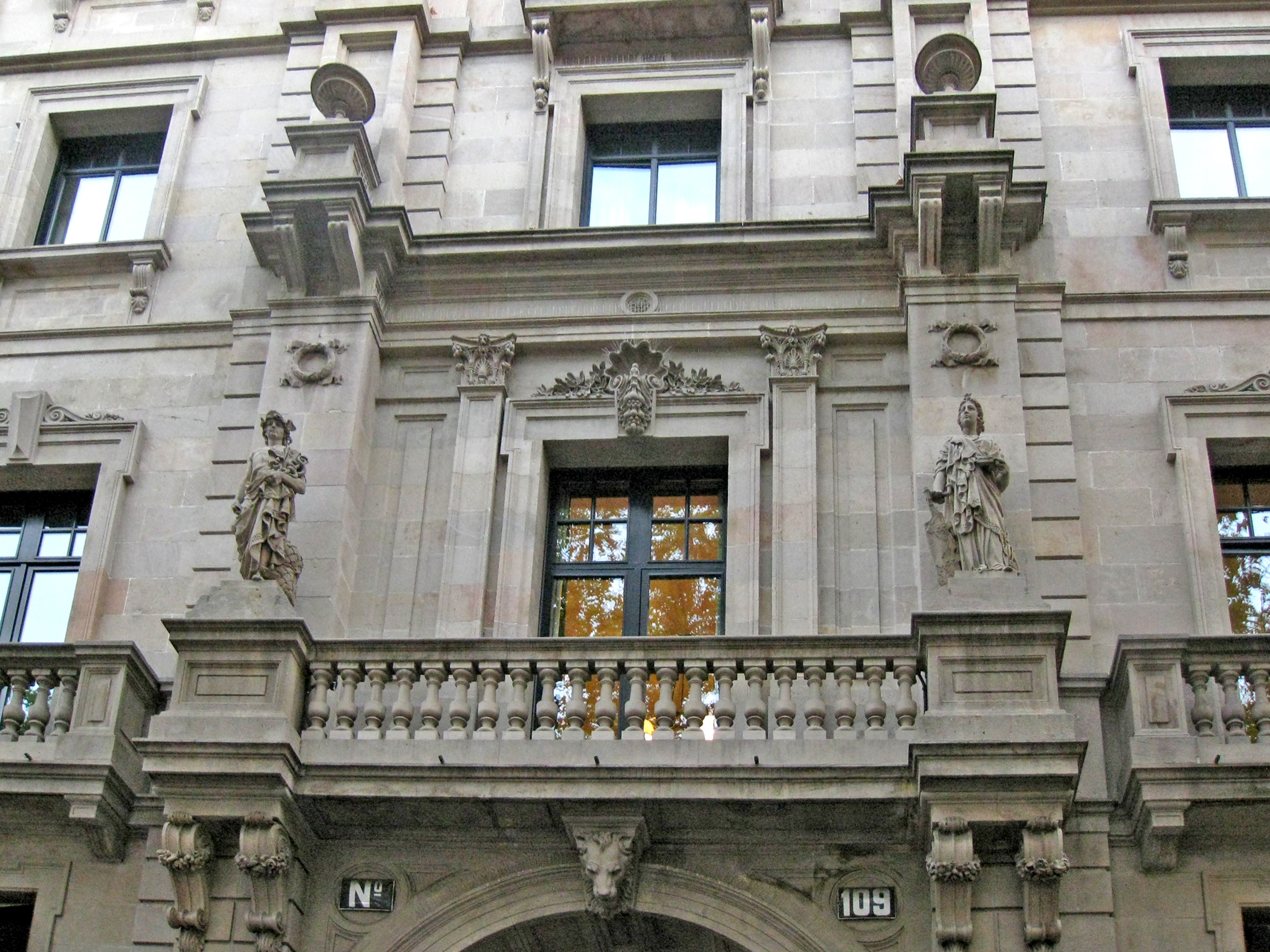 Edifici de la Companyia de Tabacs de Filipines, de Josep Oriol Mestres (1880), a la Rambla de Barcelona; avui dia és un hotel. Aquí es pot apreciar la façana que dóna la Rambla, amb les estàtues al·legòriques del comerç i d'ultramar, de Francesc Pagès (1881).